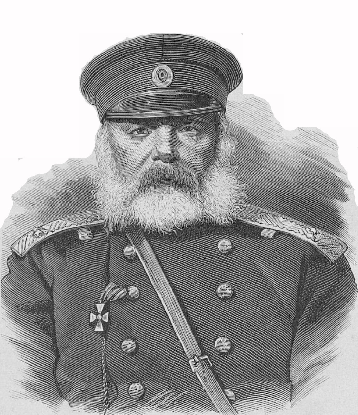 Генерал-майор Алхазов Яков Кайхосрович. Данное изображение было использовано в статье «Алхазов, Яков Кайхосрович» опубликованной во втором томе «Военной энциклопедии», который был издан книгоиздательским товариществом Ивана Дмитриевича Сытина в 1911 году в столице Российской империи городе Санкт-Петербурге.